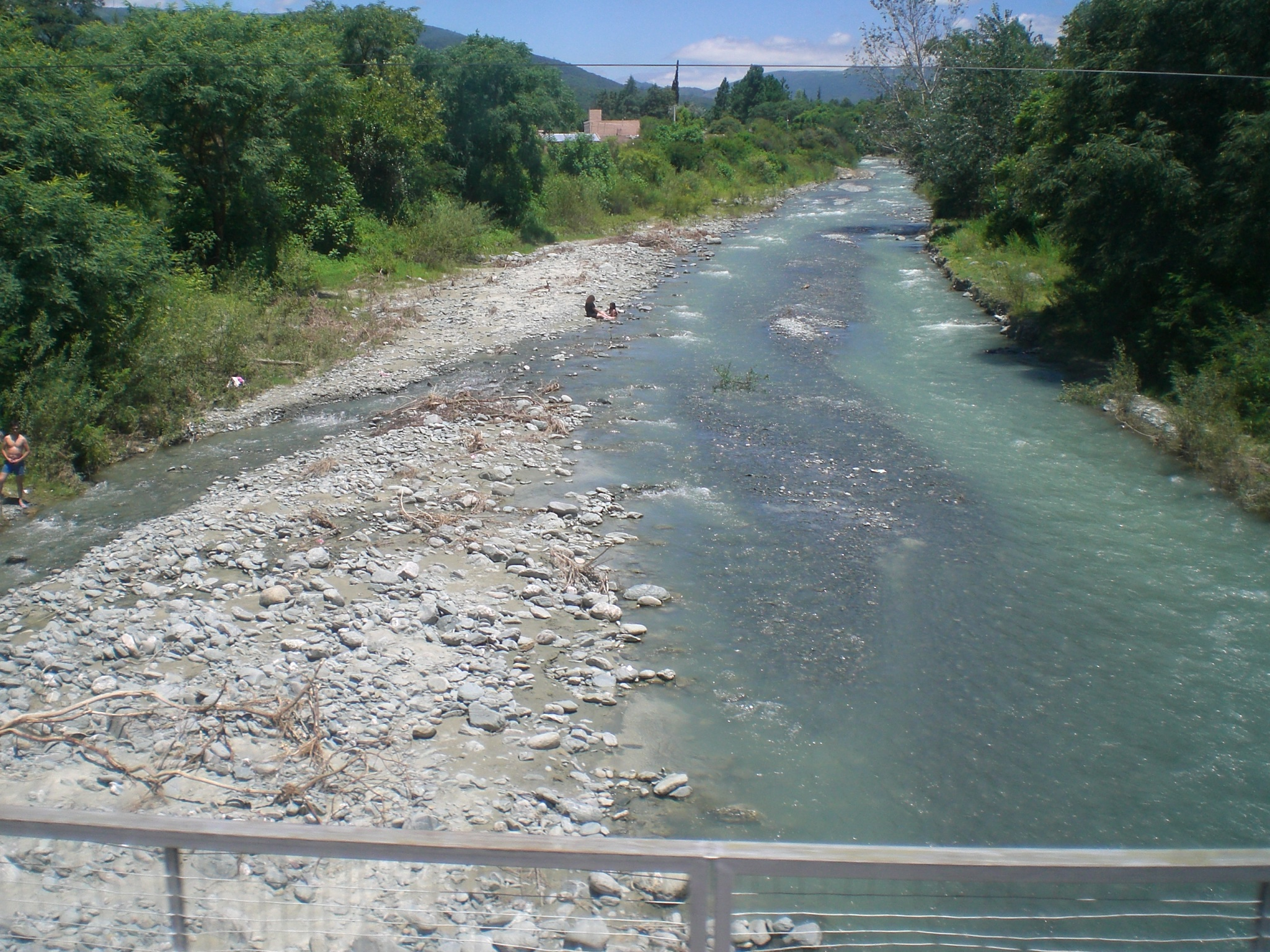 FOTO DE